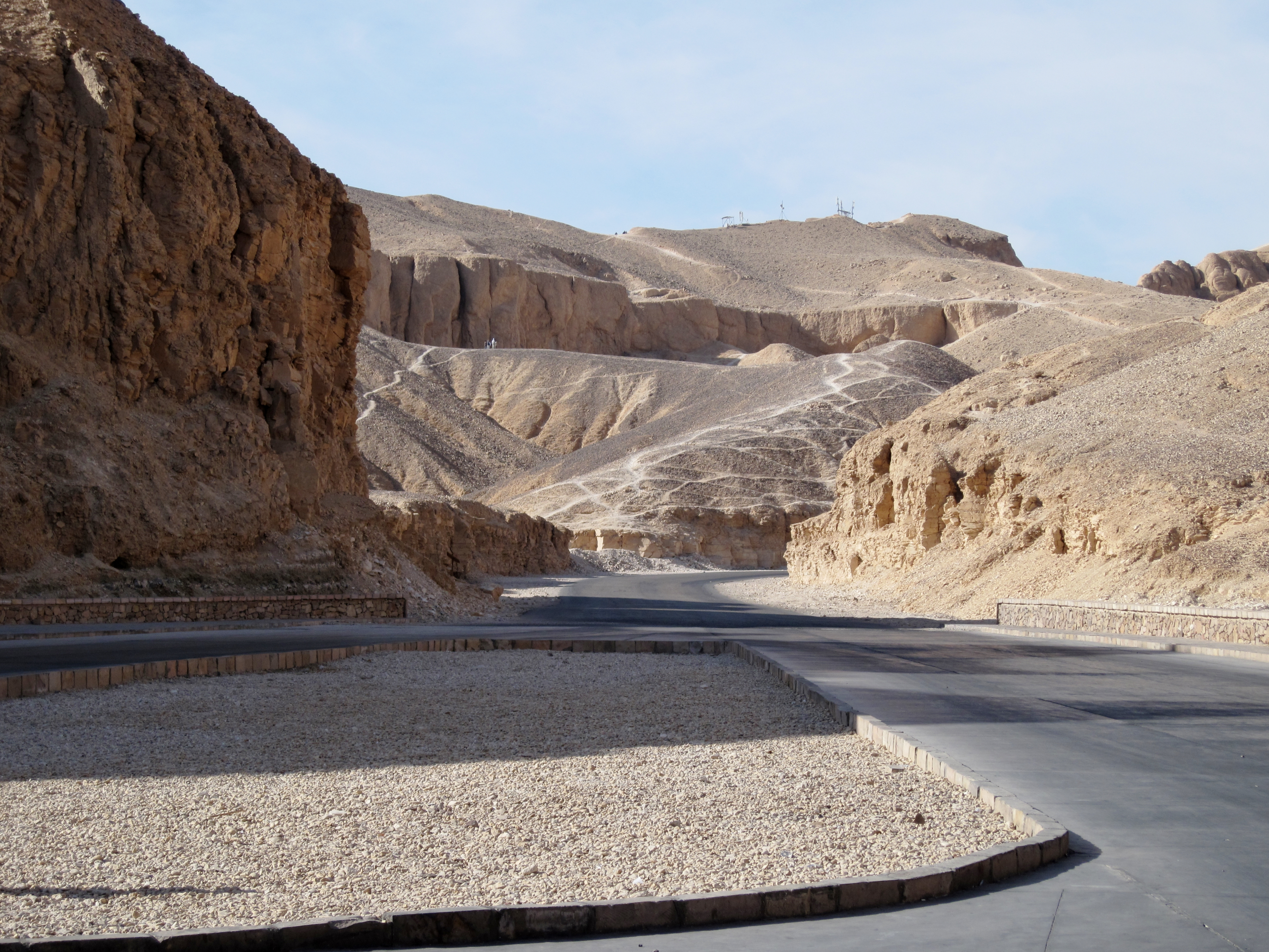 Eingang ins „Tal der Könige“, Theben-West (Luxor), Ägypten